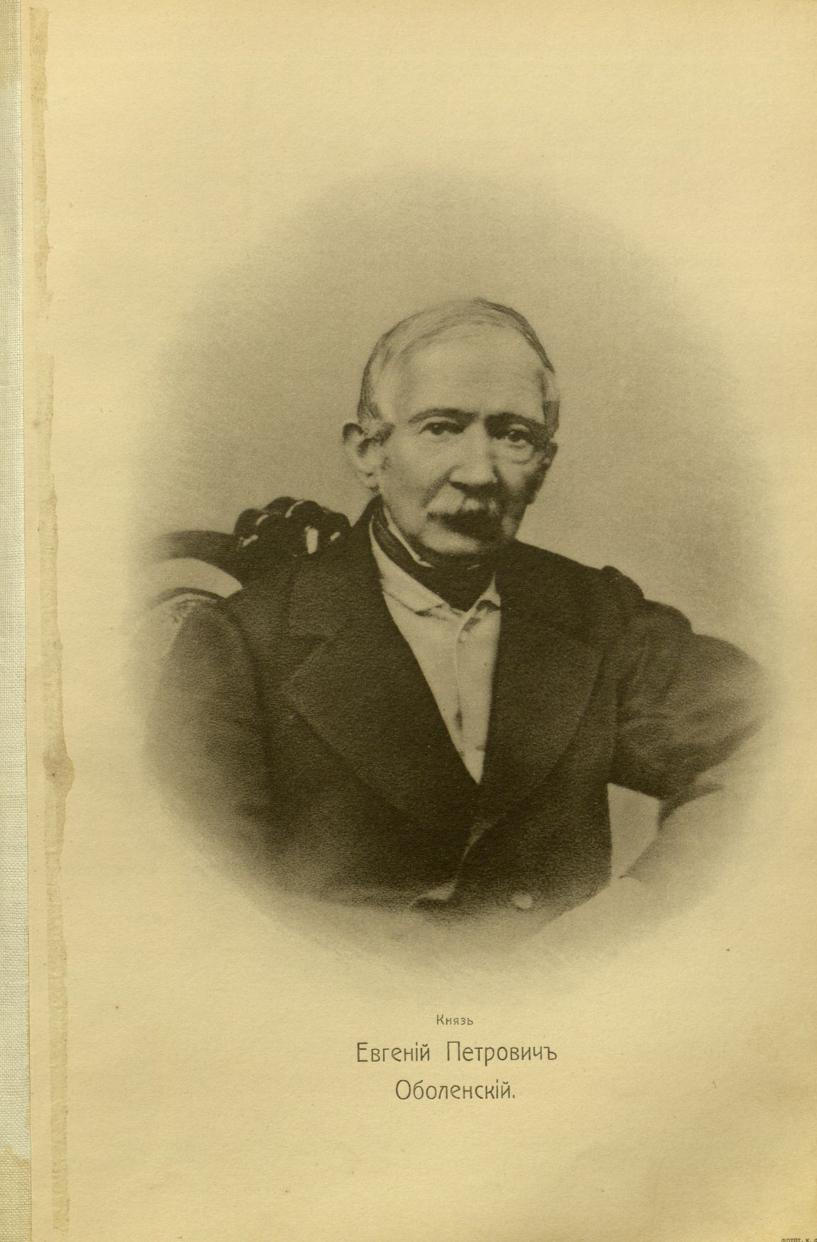 Evgeniy Petrovich Obolenskiy